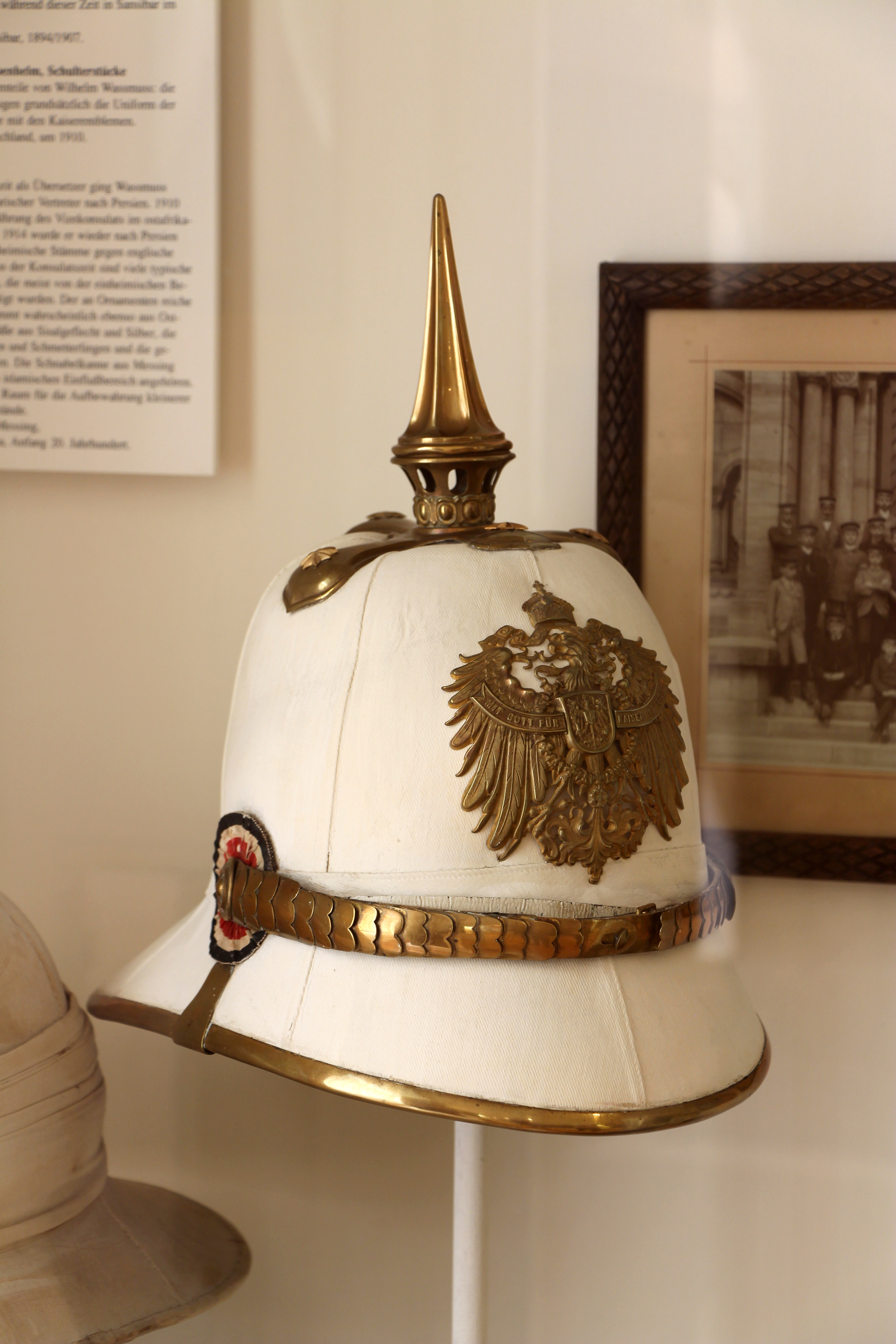 Braunschweigisches Landesmuseum. Wikimedia Deutschland. Juni 2014. Aus dem Besitz von Wilhelm Wassmuss, aus dem Braunschweigischen, der im Auswärtigen Dienst des Deutschen Reiches tätig war. Tropenhelm, Eisen/Textil, um 1910.